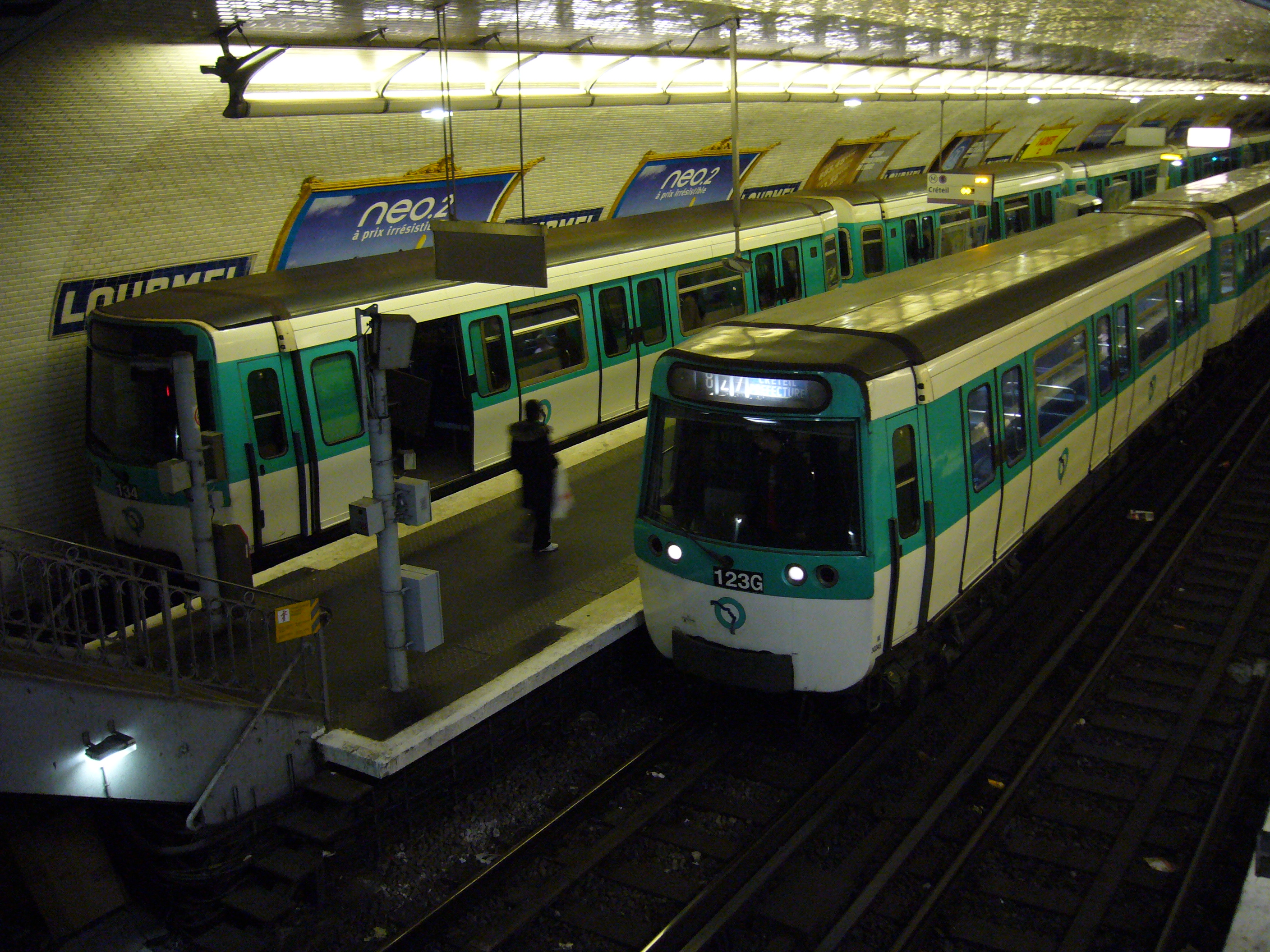 Un MF 77 est à quai en direction de Créteil à la station Lourmel sur la ligne 8 du métro de Paris.